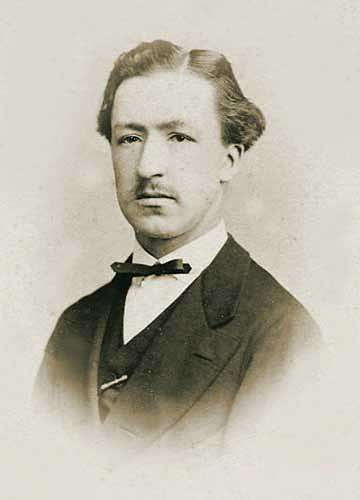 Charles Reutlinger